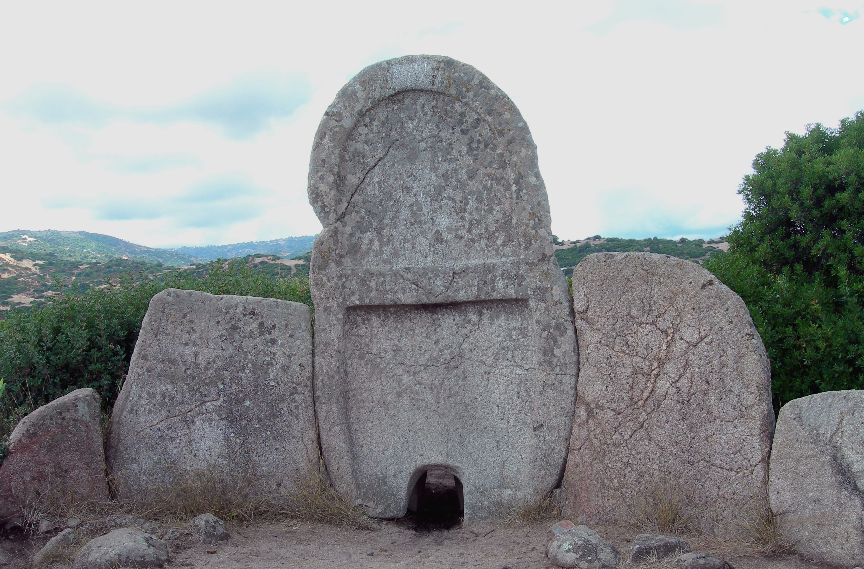 Dorgali, Sardegna, Italia